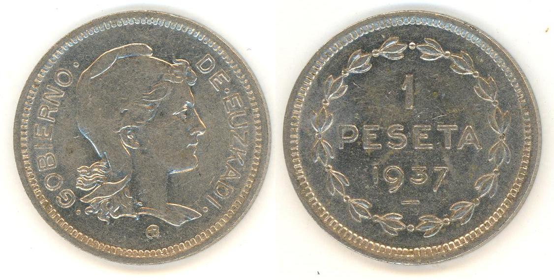 1_peseta_de_1937_de_las_provincias_vascongadas